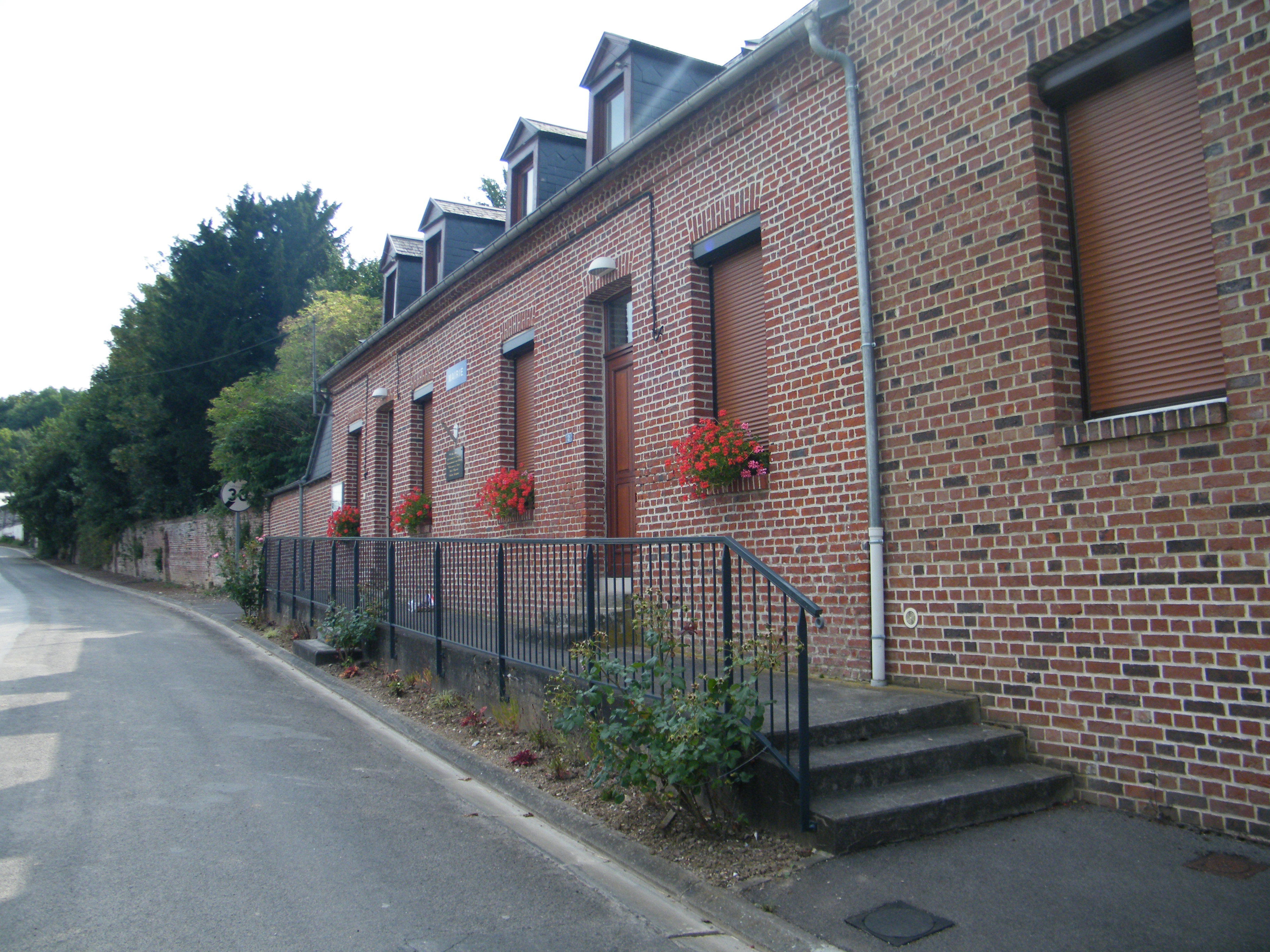 Mairie.